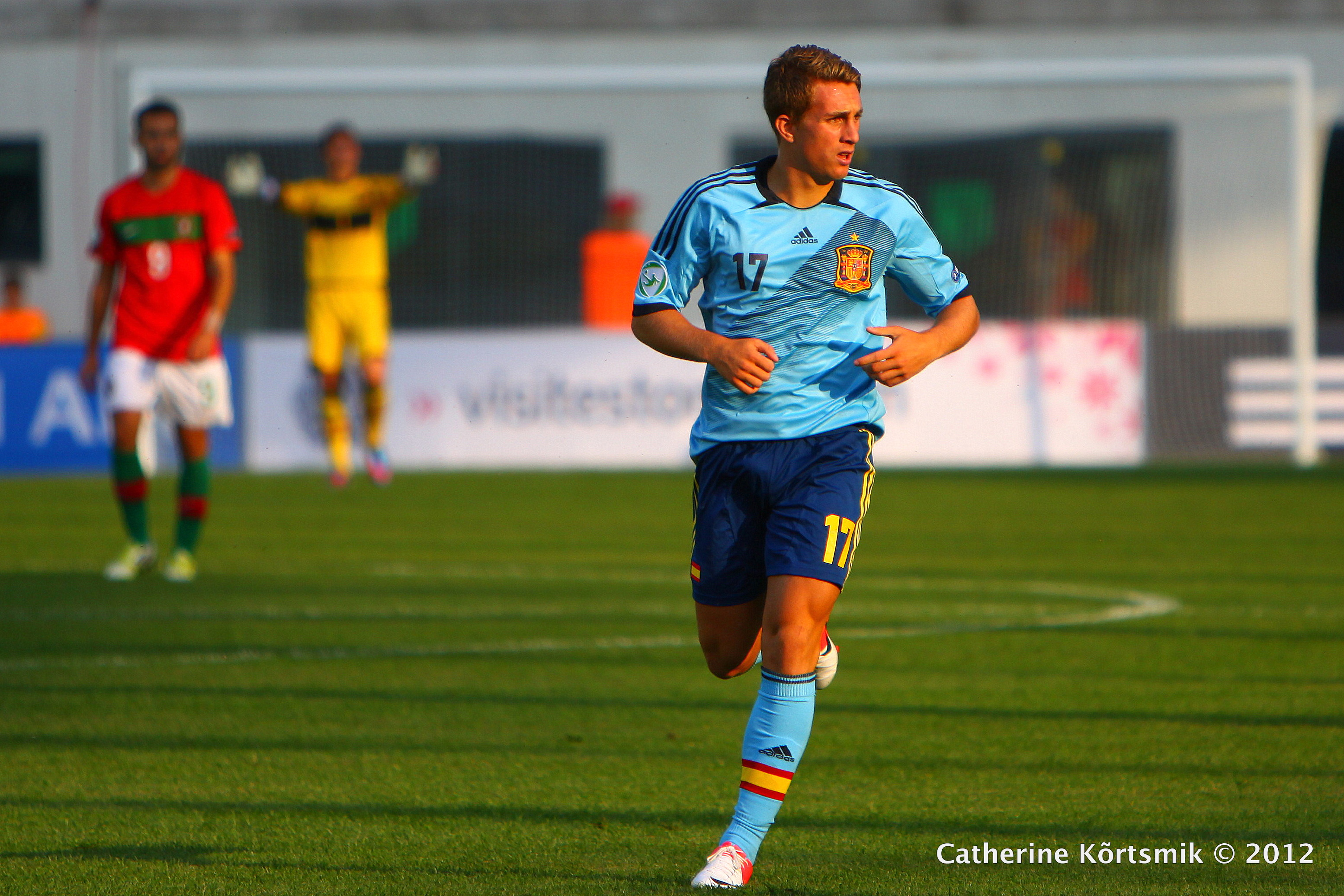 U-19 Portugal vs Spain.